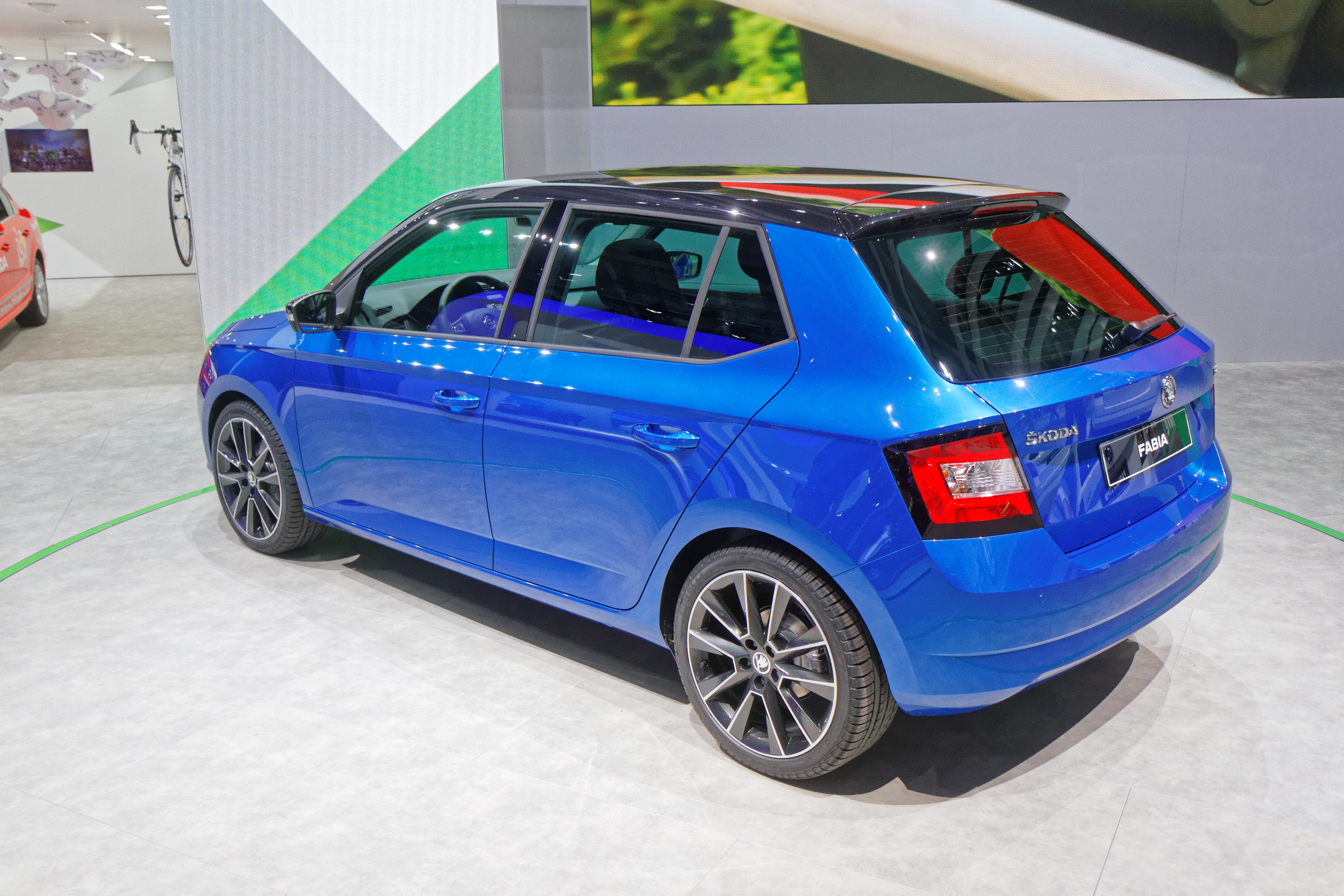 Une Škoda Fabia présentée lors du mondial de l'automobile de Paris 2014.